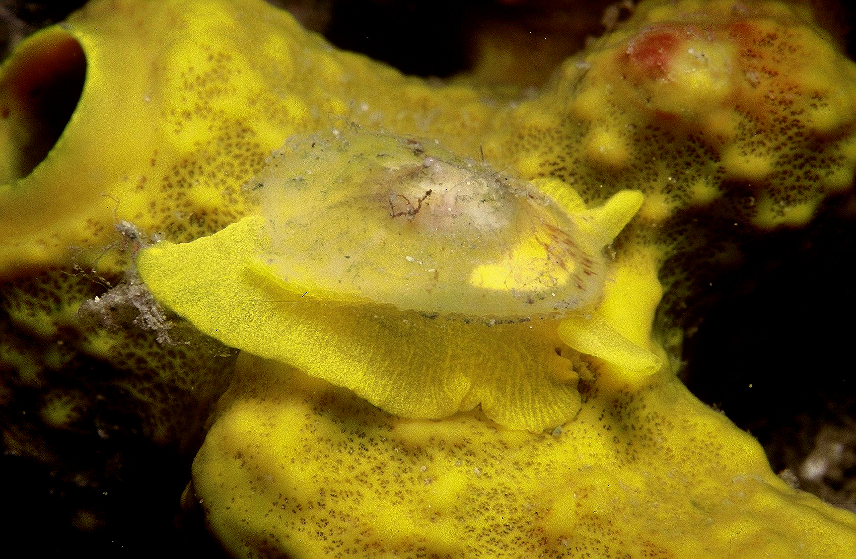 juvénile de Tylodina perversa sur le spongiaire Aplysina aerophoba qui est sa seule nourriture avec Aplysina cavernicola (Vacelet, 1959) - obs. pers.. Le mollusque est homochrome avec sa proie, en vieillissant, la coquille, jaune chez le juvénile, s'ornera de végétaux et autres. Il est à noter que ce mollusque à une couleur identique à celle de l'intérieur de l'éponge.